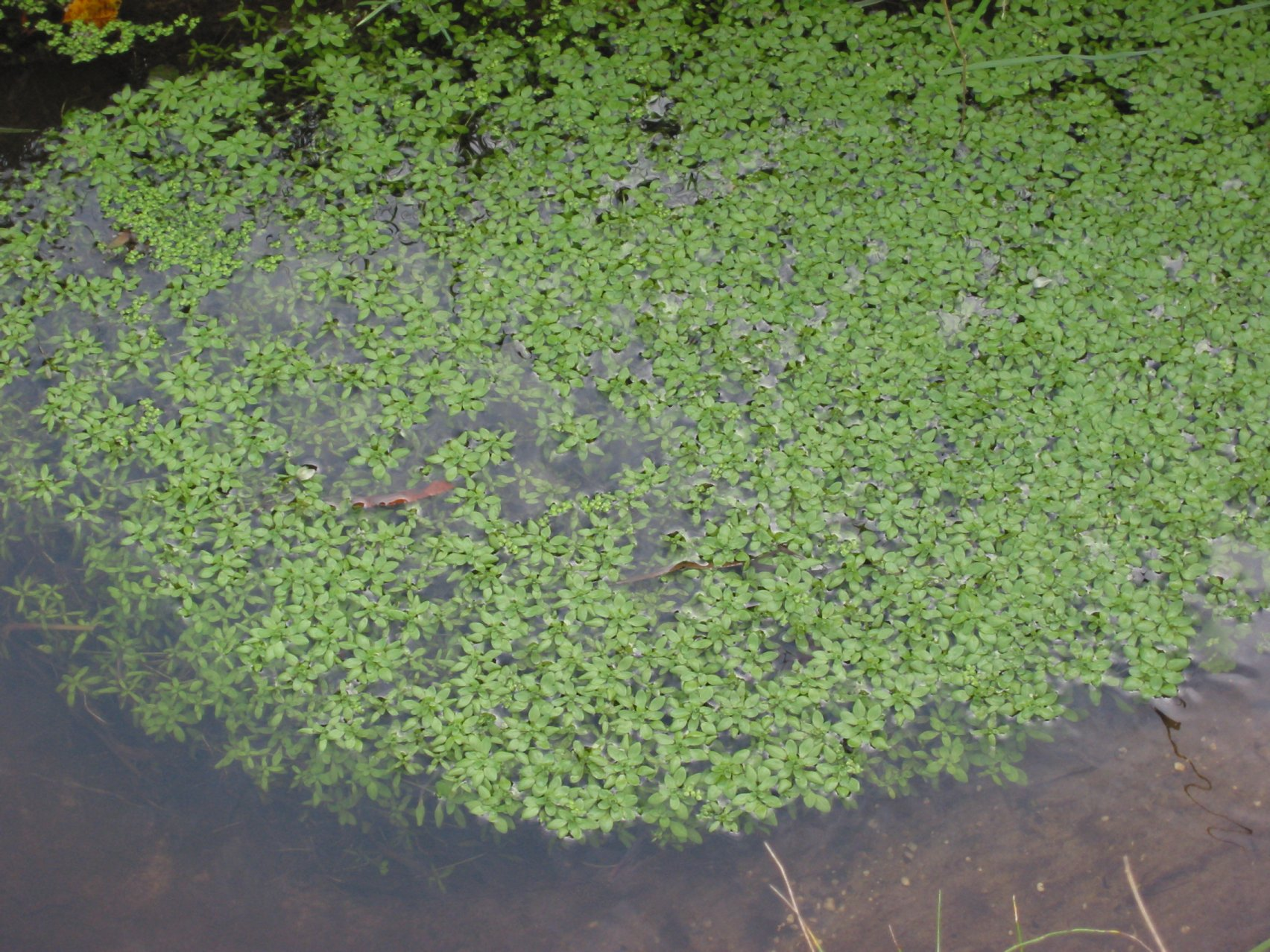 (Gewoon sterrenkroos) Callitriche platycarpa